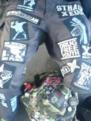 Hose eines Straight Edge